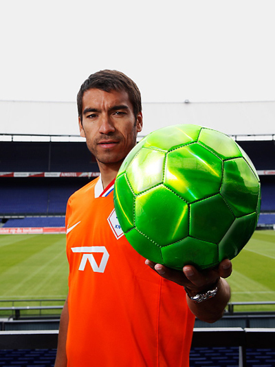 Giovanni van Bronckhorst met de "groene bal" - symbool voor voetbalprojecten die zich naast voetbal inzetten voor verbetering in de wijken onder het motto "meer dan voetbal".